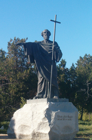 Памятник апостолу Андрею в Херсонесе